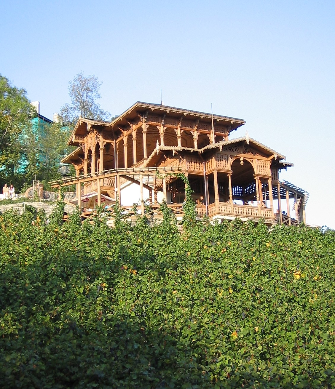 Havlíčkovy sady